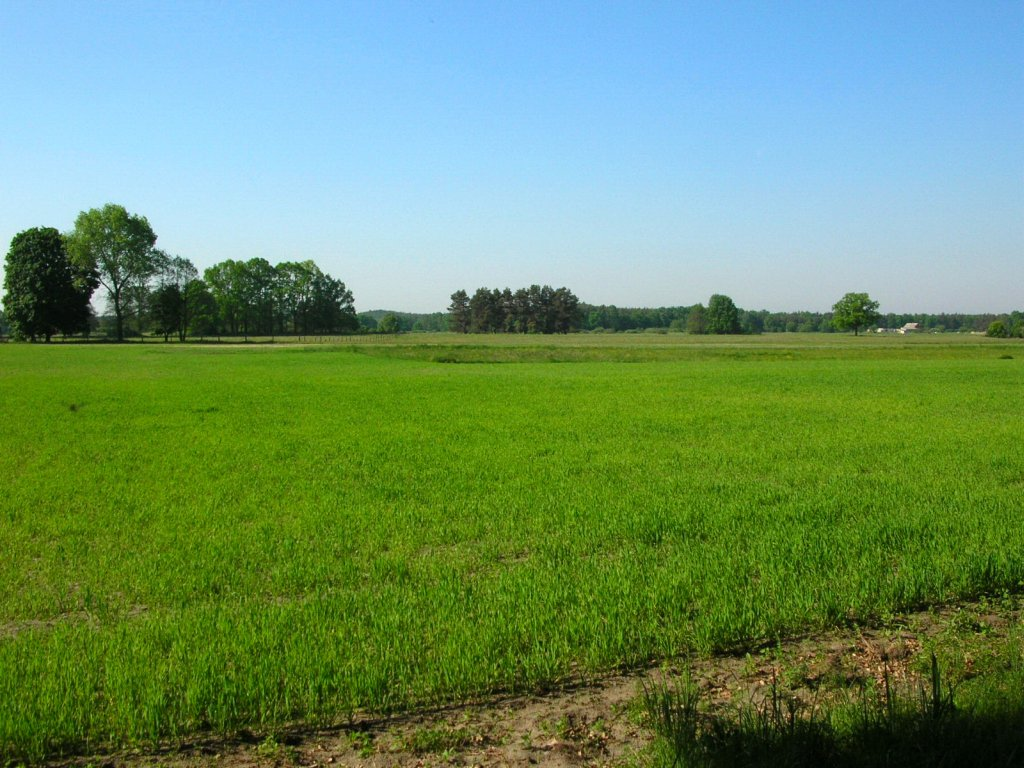 Łąki nadnoteckie k. Bydgoszczy